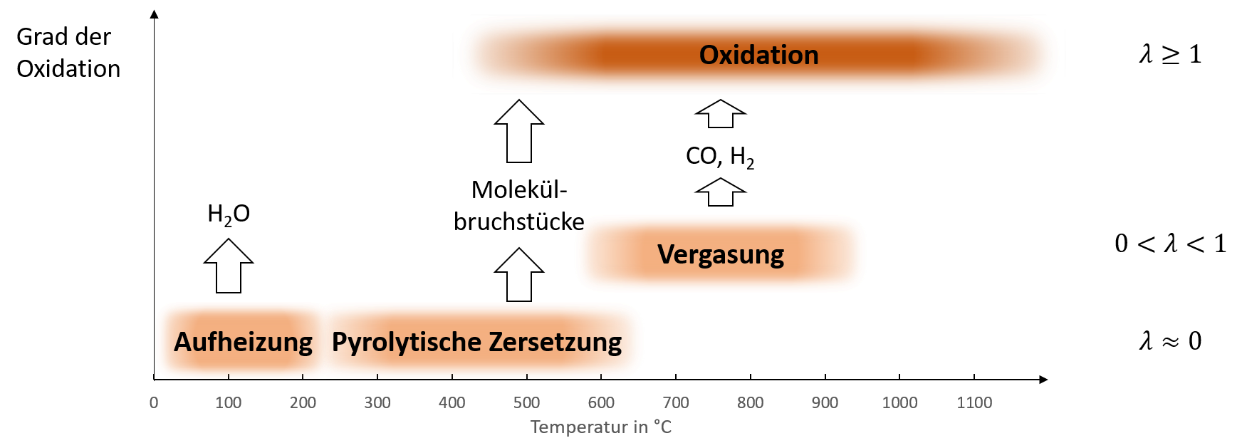 Schematische Darstellung der vier Phasen bei thermo-chemischen Umwandlungen / Verbrennungen nach Temperatur und Grad der Oxidation. Die Übergänge sind fließend, daher sind die Temperaturbereiche nicht exakt zu nehmen. Die exotherme Oxidation ist im Vergleich zu den anderen Phasen dunkler hinterlegt.